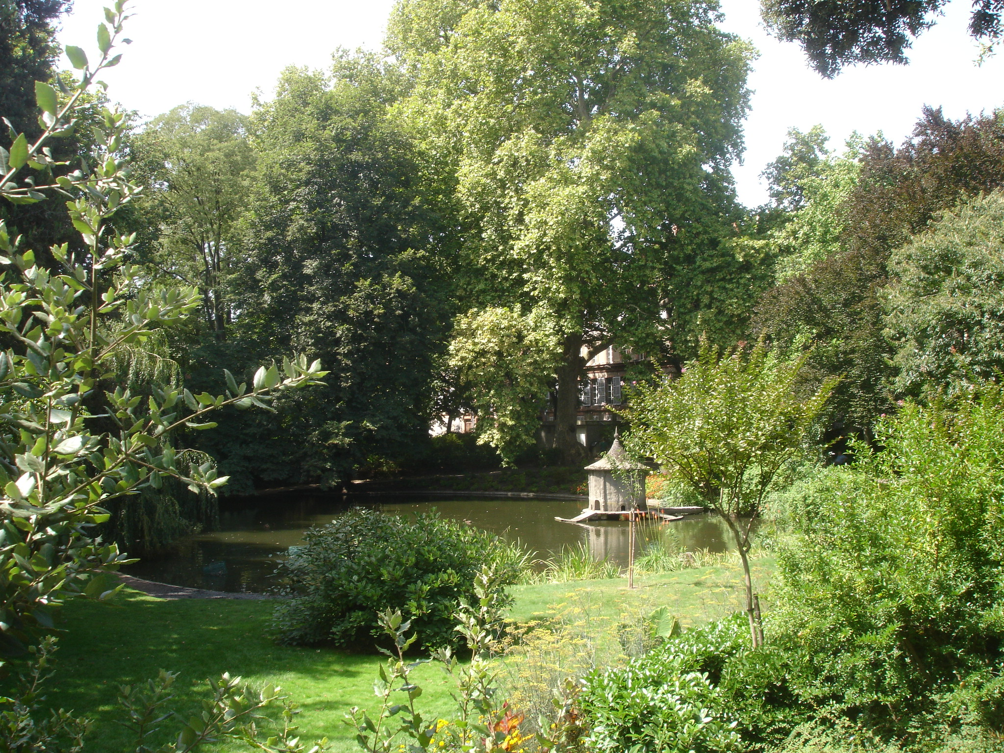 France, Haute-Garonne (31), Toulouse, Jardin royal